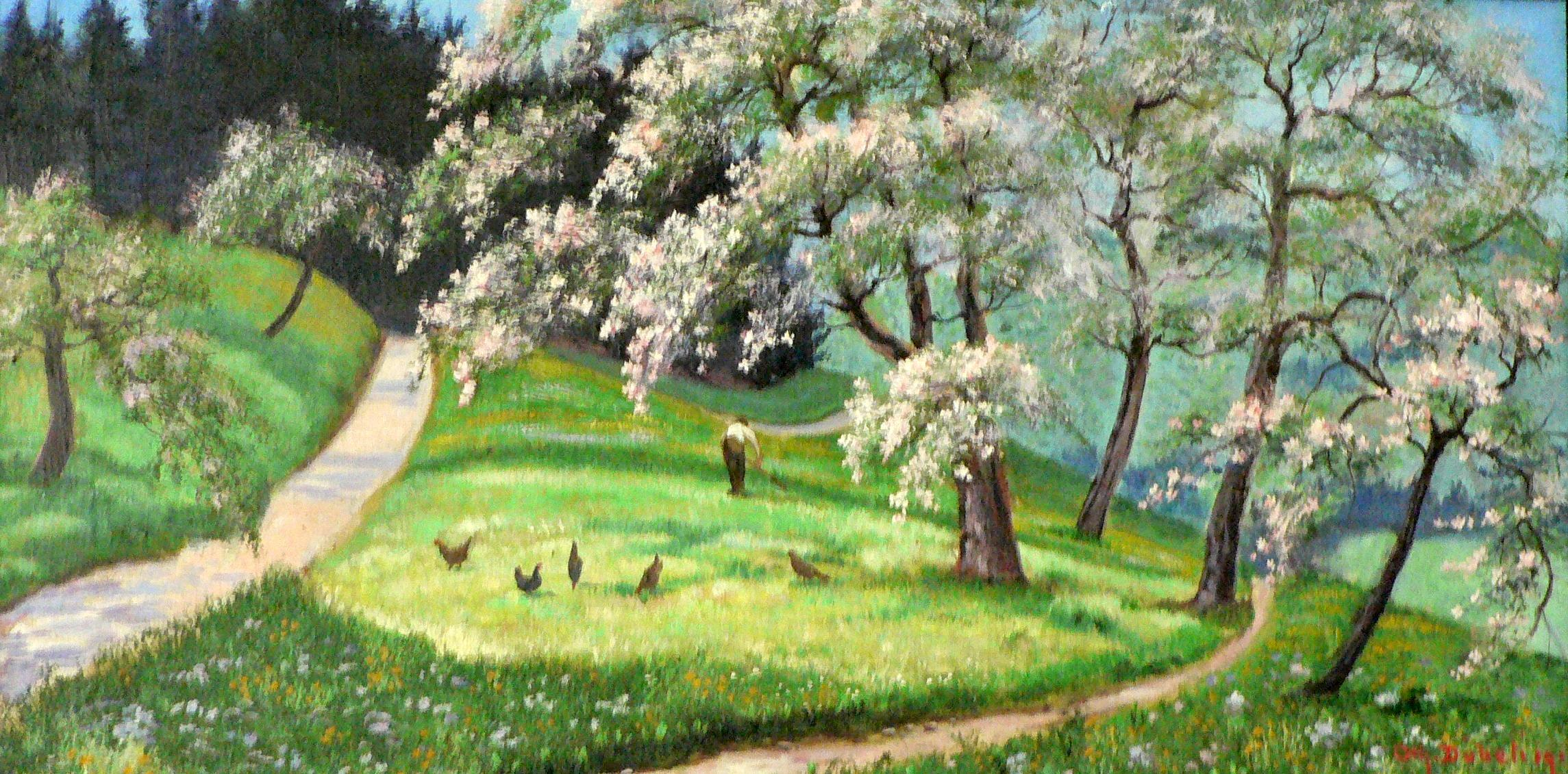 Eine selbstgemachte Photographie eines Doebeli-Bildes das sich in meinem Besitz und Eigentum befindet.